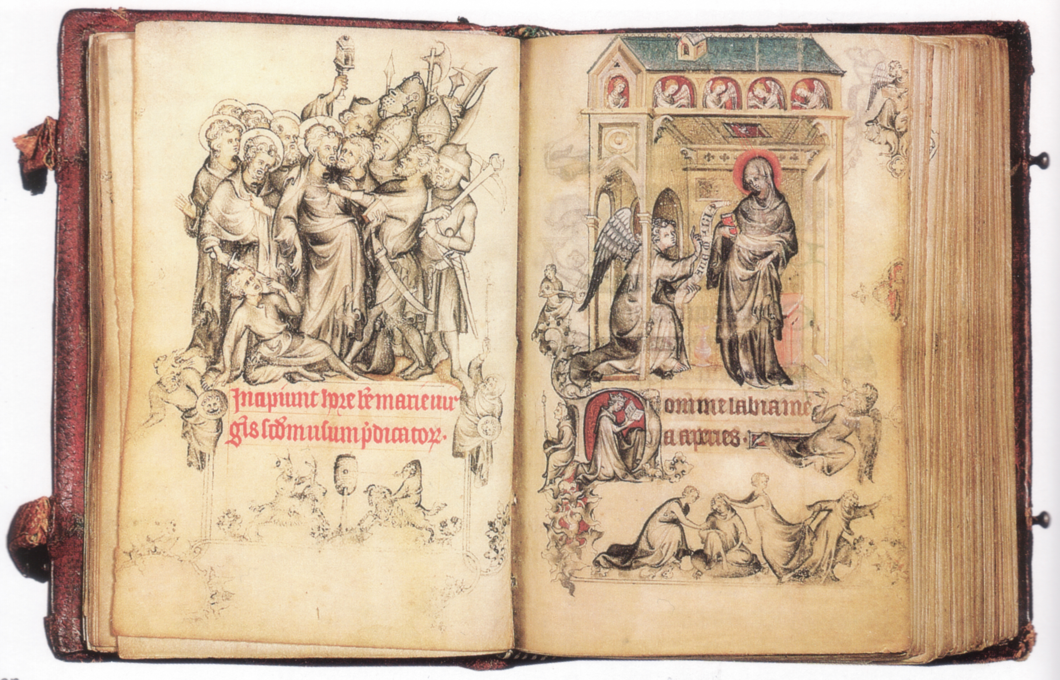 Heures de Jeanne d'Evreux; 15v/16r